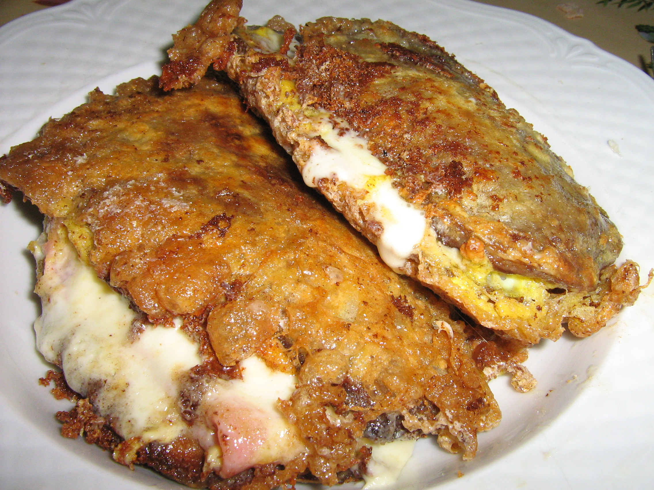 Secondi